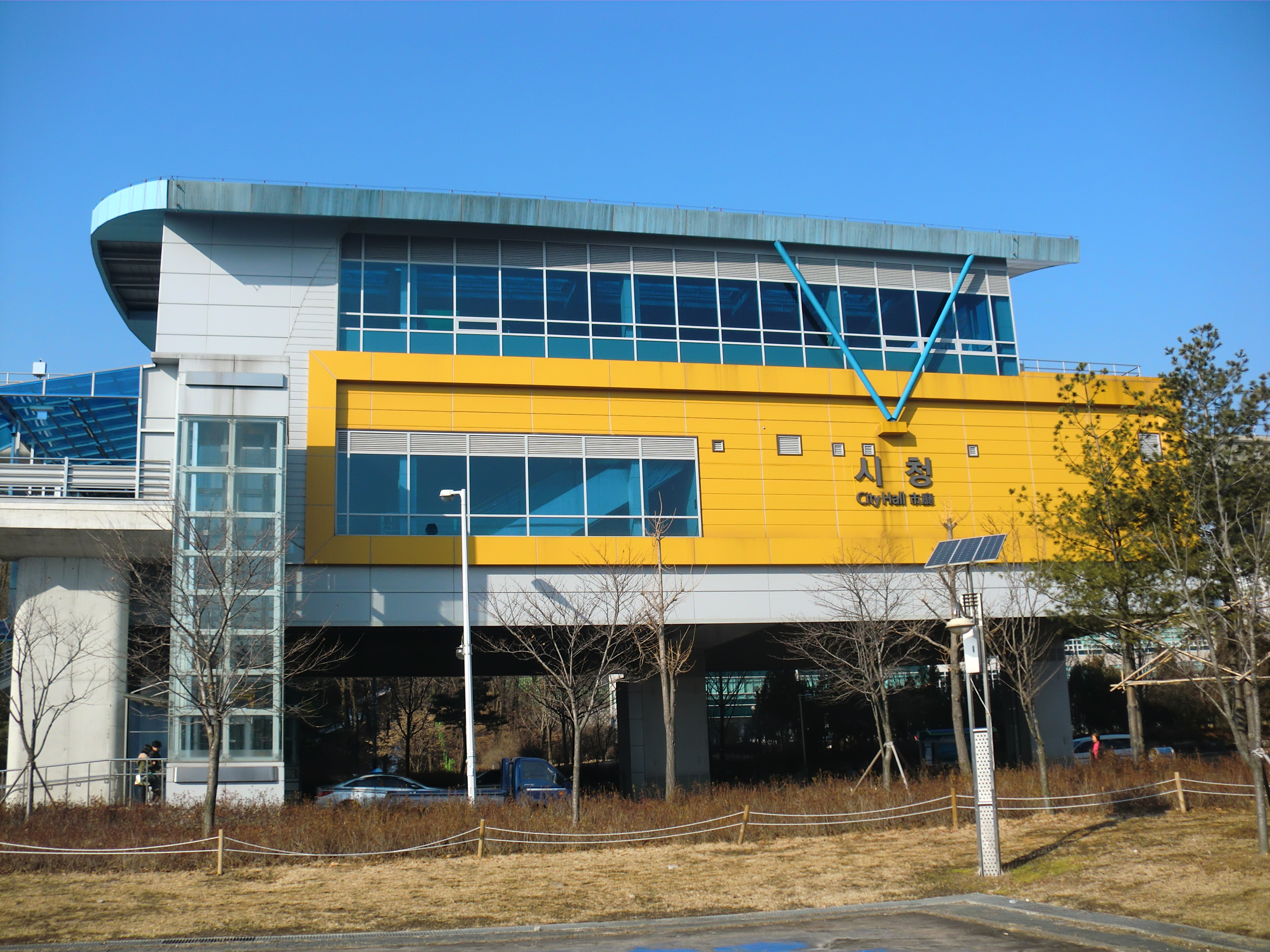 의정부경전철 시청역